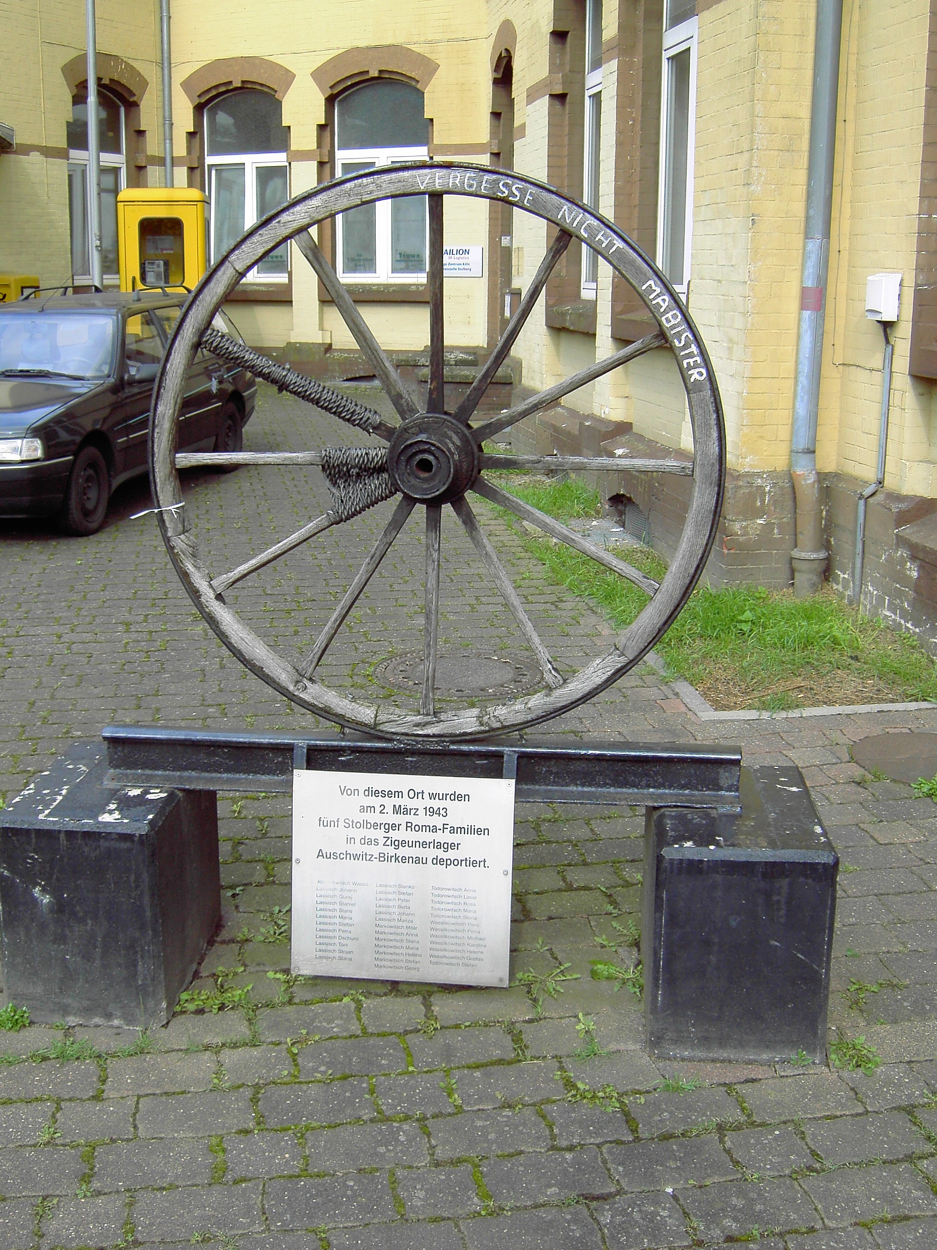 Denkmal für deportierte Romafamilien in Stolberg /Rhld.